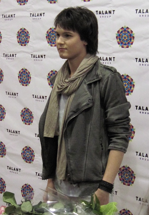 Українській співак Борис Апрєль